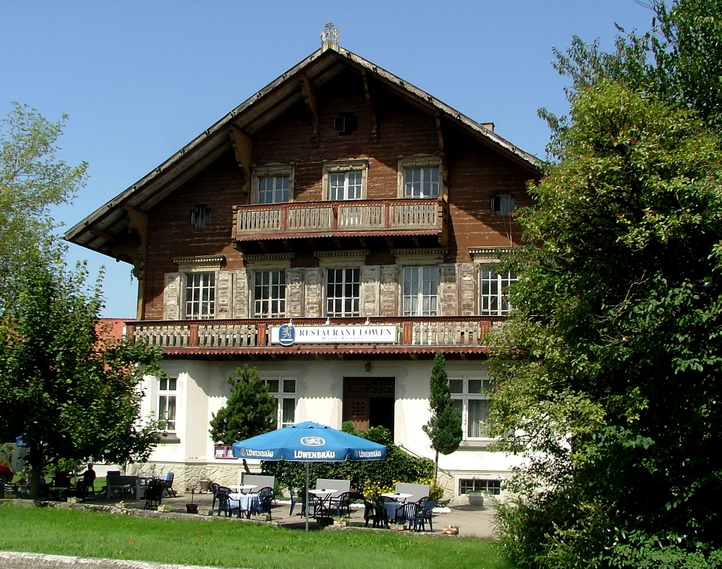 Opfenbach